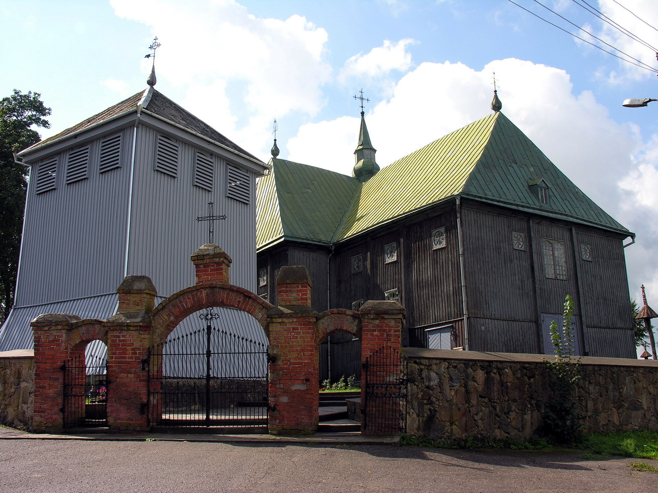 Žemaitėška: Seda, Mažėikiū rajuons, Seduos seniūnėjė Seduos Švč. Mergelės Marėjės jėmėma i Dongū bažnyčė Puortegrapėjė Algėrda, 2006 m. rugsiejė 2 d.